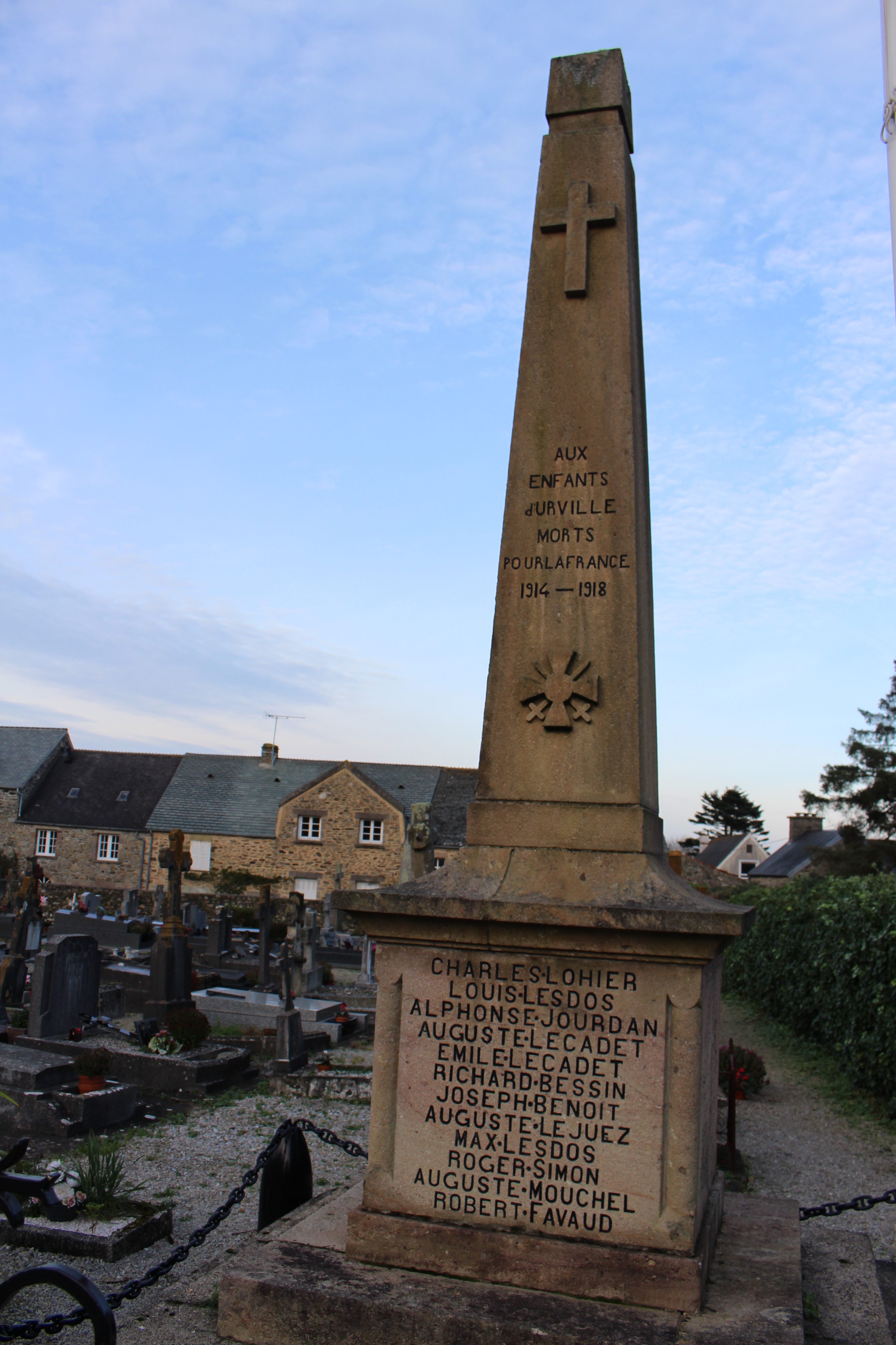 Urville-Nacqueville, Manche